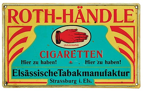 Werbeschild für Roth-Händle Cigaretten, Blechschild, Elsässische Tabakmanufaktur, Straßurg im Elsaß, ca. 1910, 26 x 16 cm